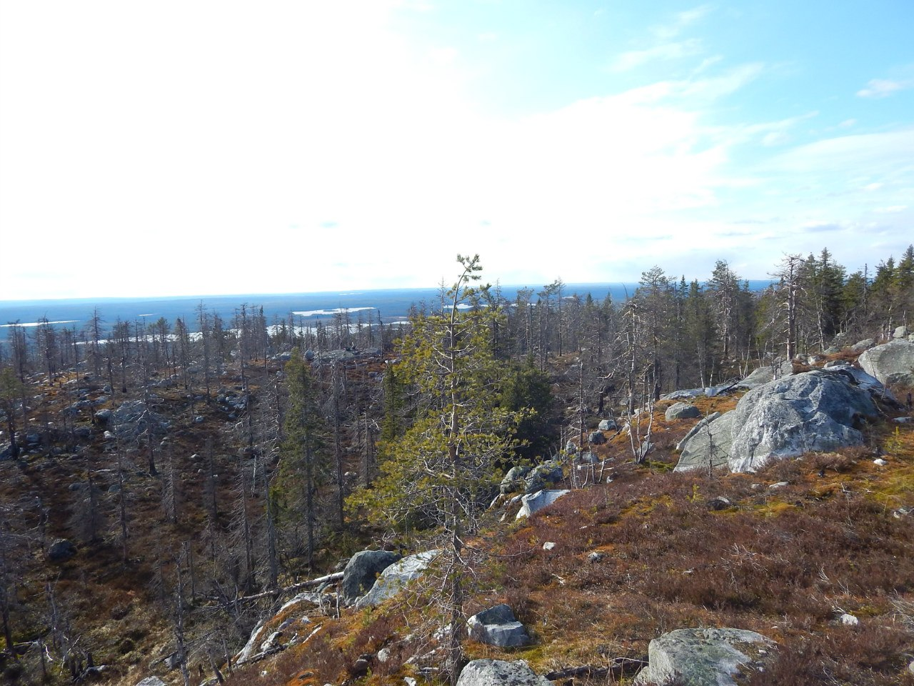 Воттоваара, Муезерский район This image is related to the protected area of Russia number 1010100